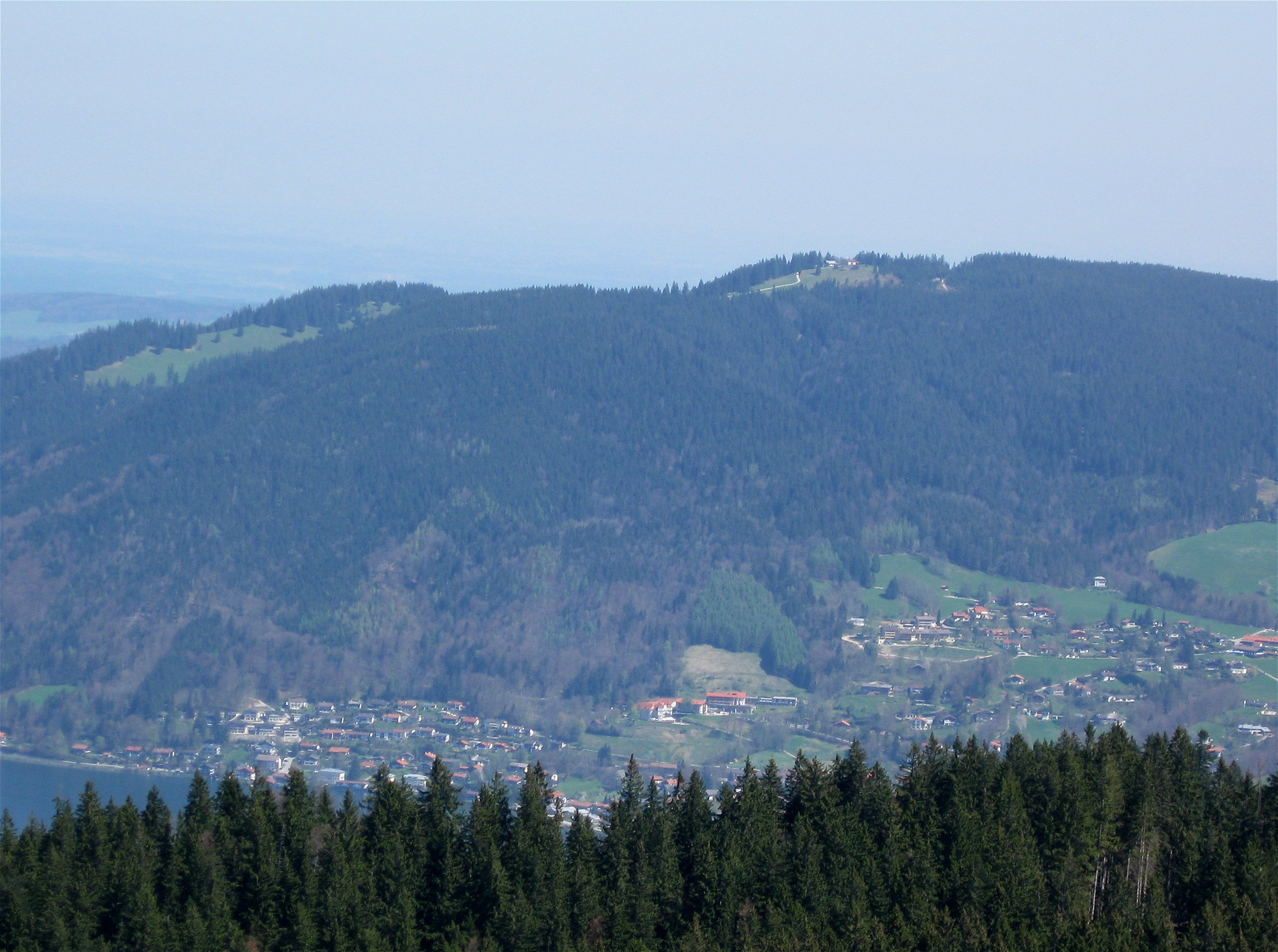 Neureuth über dem Tegernsee, vom Hirschberg gesehen